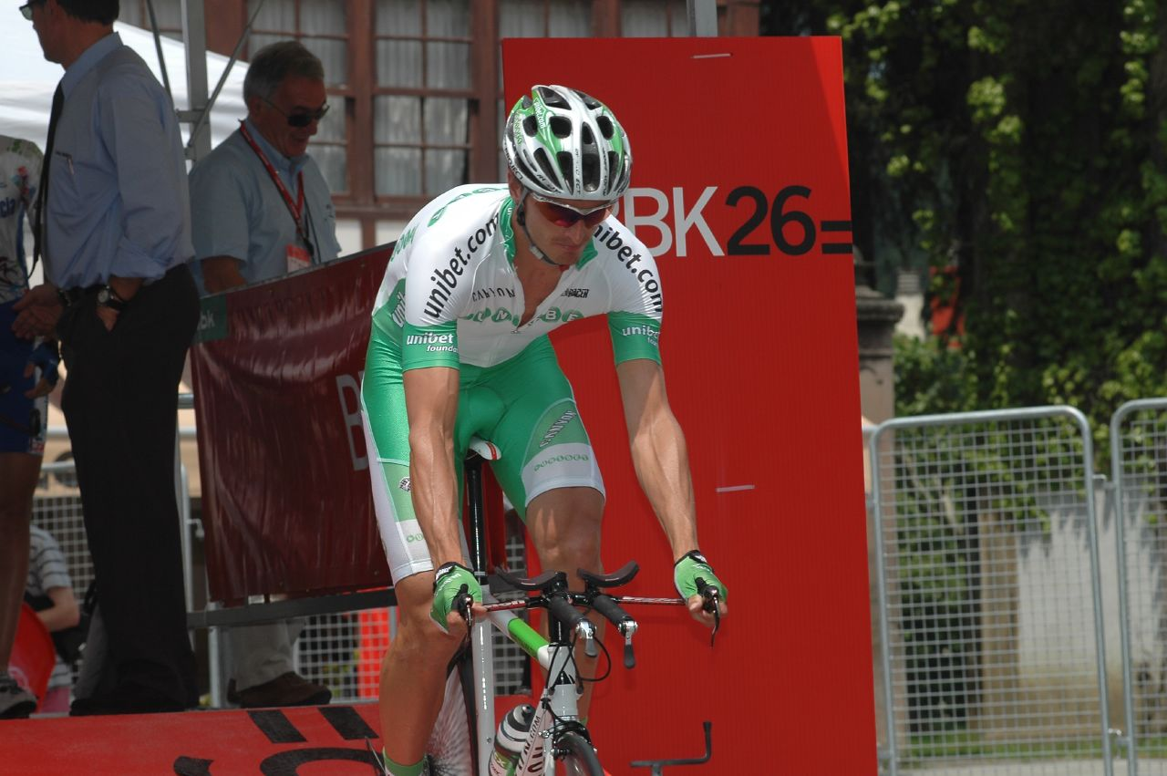 Marco Zanotti, Euskal Bizikleta 2007